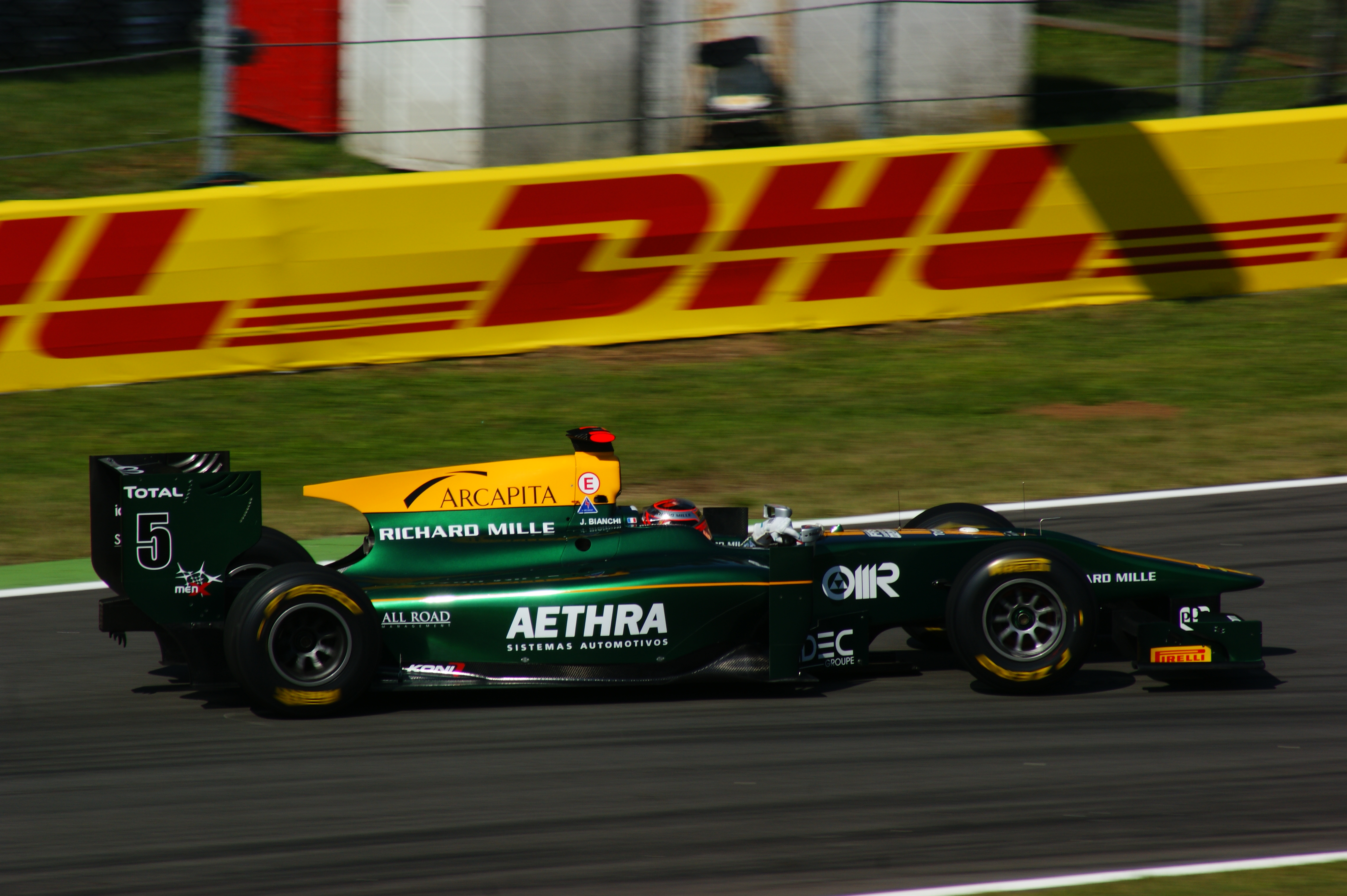 Jules Bianchi alla prima variante Monza 2011